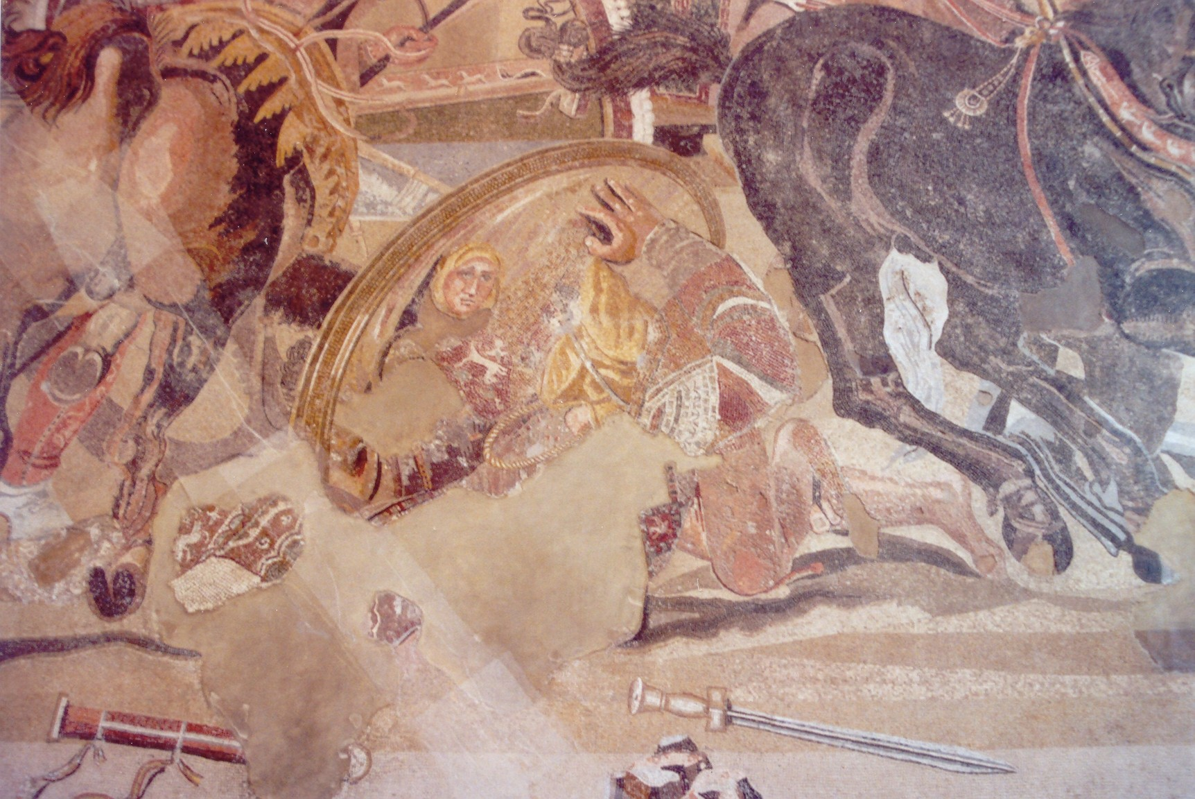 Détail de la mosaïque "Bataille d'Issos" entre Alexandre et Darius. Le reflet du visage du soldat perse (vu de dos) est visible dans son bouclier. Origine : Maison du Faune, Pompéi. Actuellement au Musée archéologique de Naples (octobre 2005).